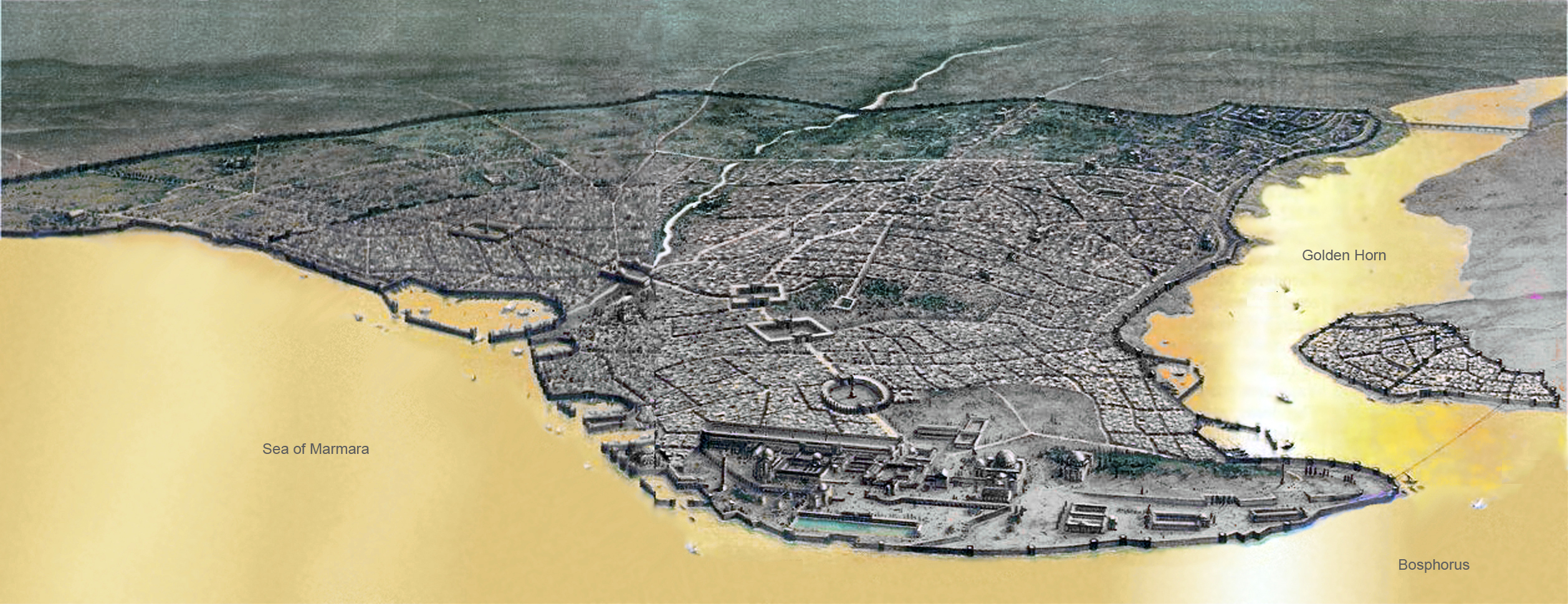 Constantinople in Byzantine times